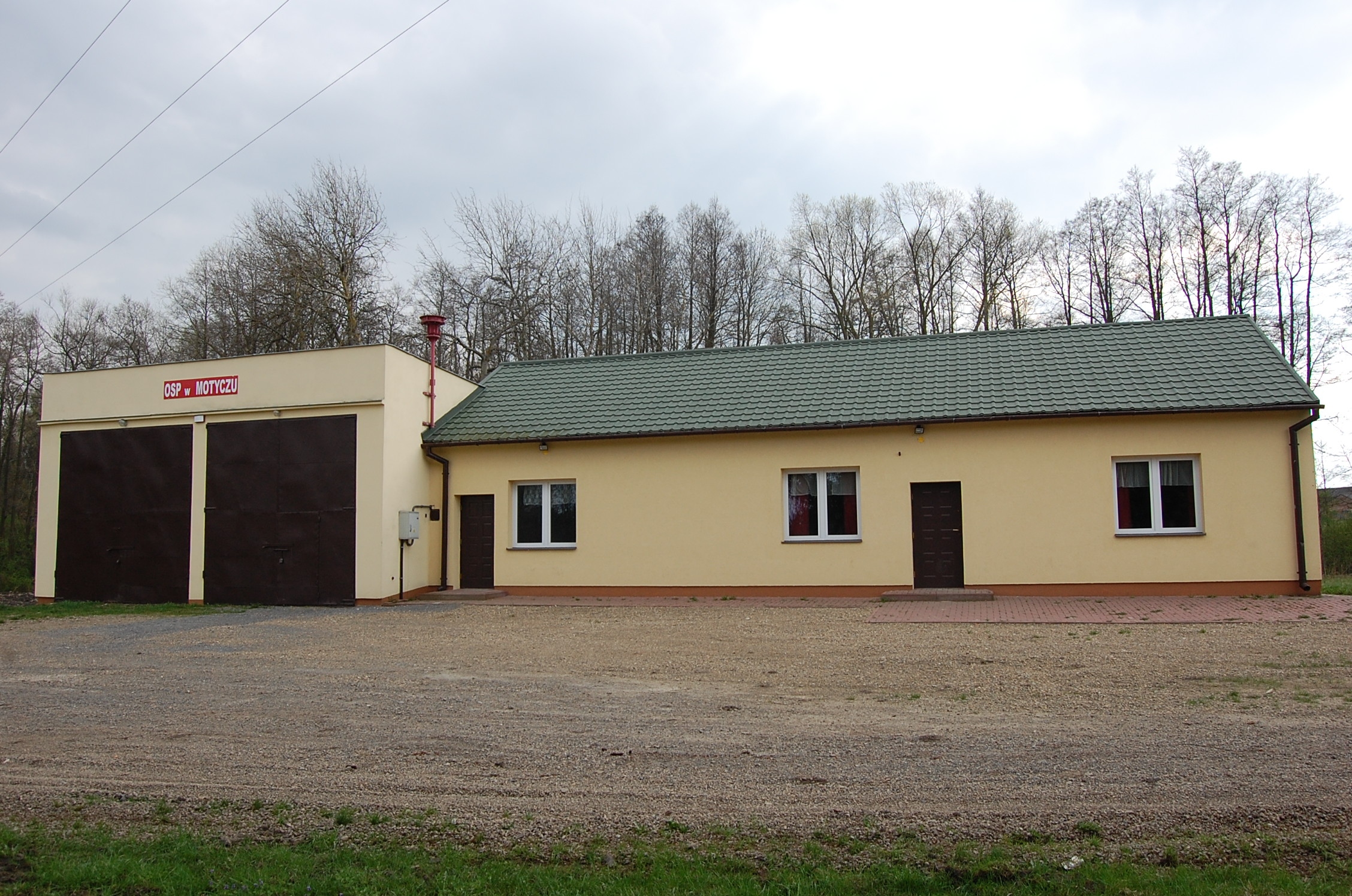 Budynek OSP w Motyczu